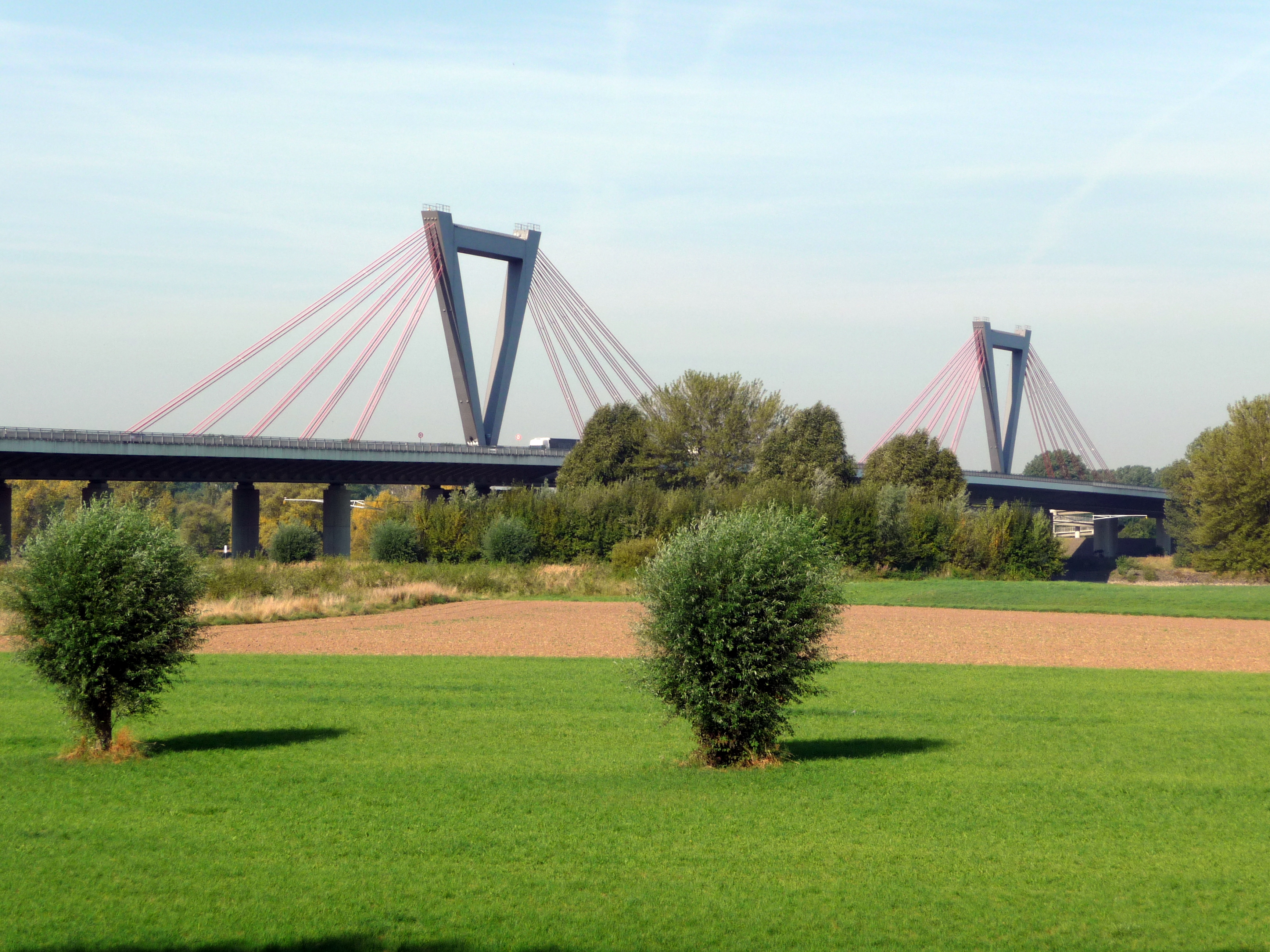 Die Rheinbrücke der A44 Nähe Flughafen